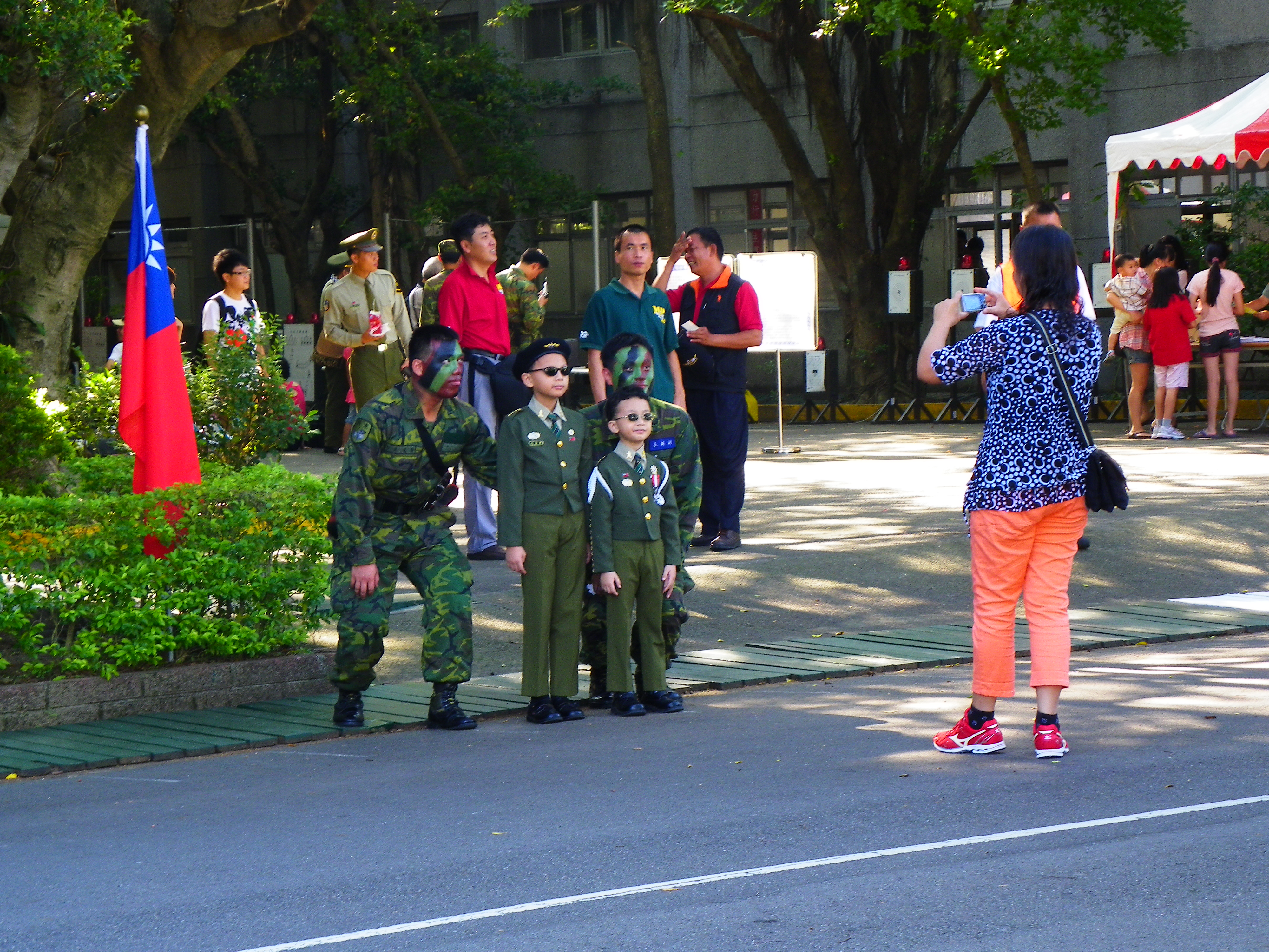 2012年憲兵學校林口校區營區開放活動，母親為兩位軍服裝扮的孩子，與憲兵裝甲營戰士合影。